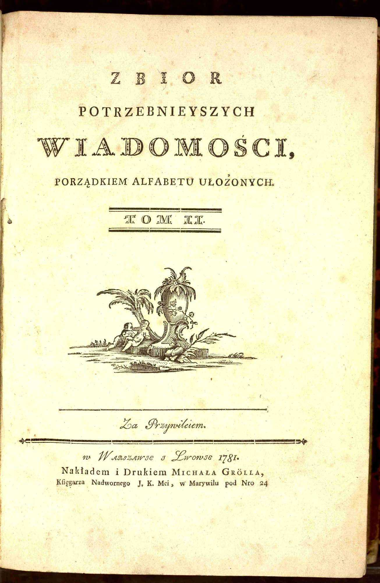 Karta tytułowa tomu II encyklopedii pióra Ignacego Krasickiego "Zbiór potrzebniejszych wiadomości"